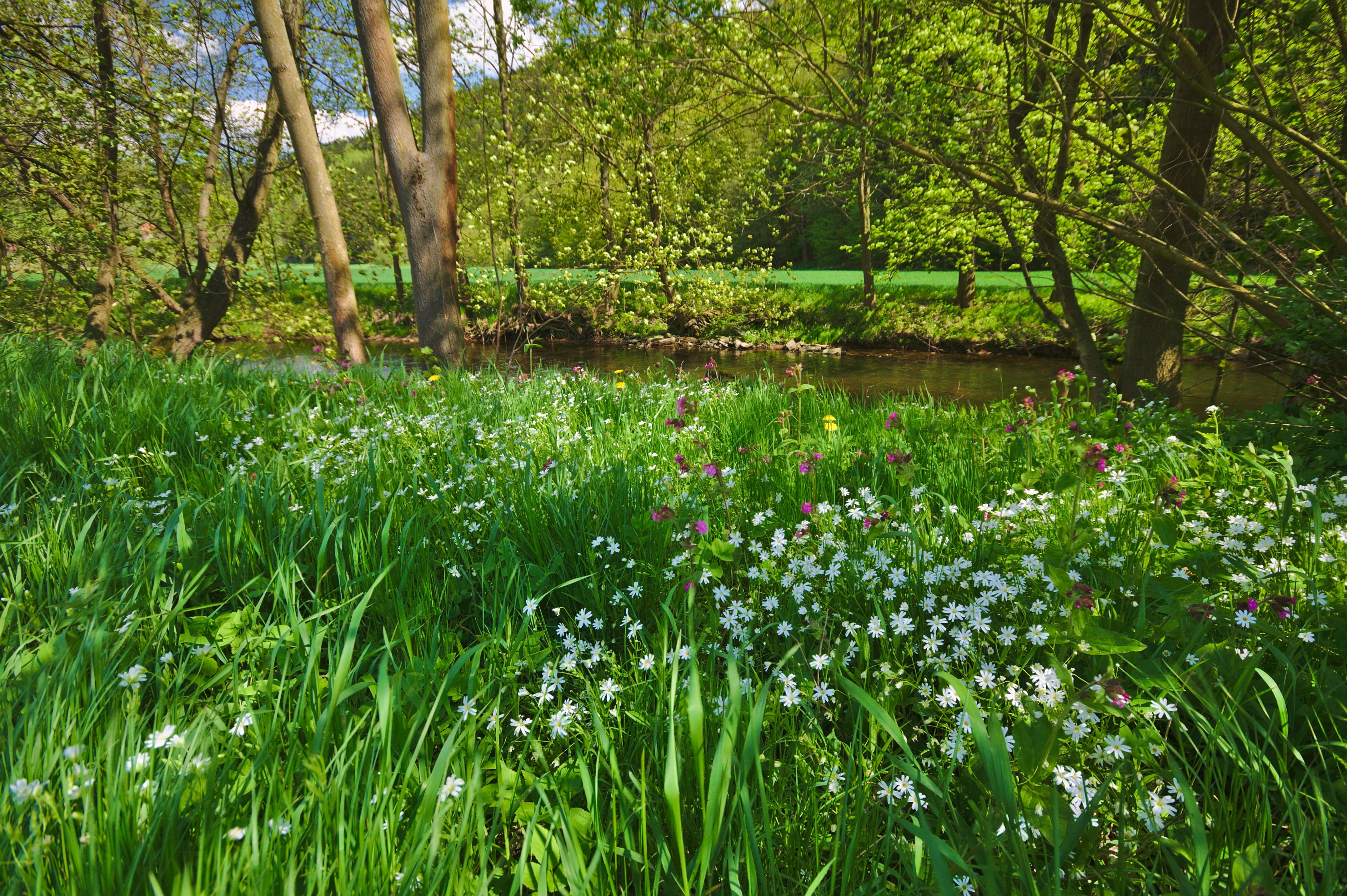 Přírodní památka Svratka, okres Žďár nad Sázavou